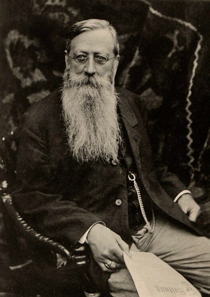 Foto von Alban von Dobeneck